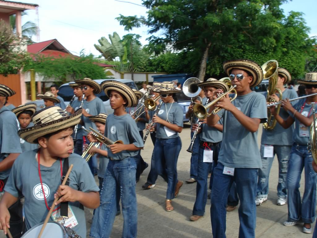 Festival del Porro en San Pelayo, Cordoba. Colombia